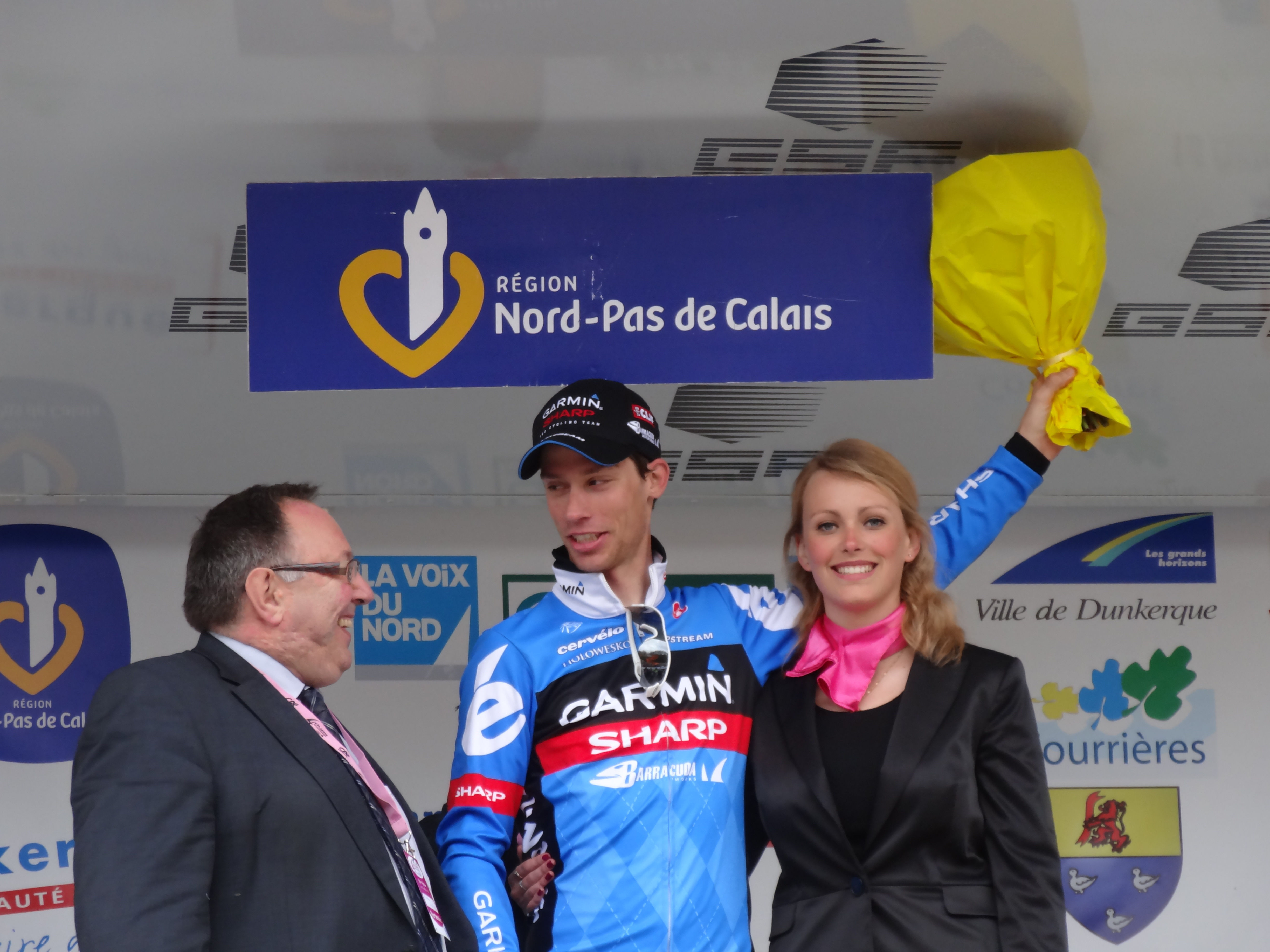 Reportage photographique réalisé le samedi 4 mai 2013 à l'arrivée de la quatrième étape de l'édition 2013 des Quatre jours de Dunkerque à Maisnil-lès-Ruitz, Pas-de-Calais, Nord-Pas-de-Calais, France, dans le bassin minier du Nord-Pas-de-Calais. Ce fichier représente un ou plusieurs coureurs cyclistes que JÄNNICK Jérémy n'est pas parvenu à identifier, ou n'a pas eu le temps de le faire. Si vous le reconnaissez, supprimez Quatre jours de Dunkerque 2013|Cycliste non identifié et remplacez le par Depicted person|1= :Category: | et placez Category: en bas de page. Si vous souhaitez qu'un portrait soit généré à partir de cette image, contactez son auteur qui s'en chargera, afin que ce nouveau fichier soit cohérent avec les autres réalisés. Des notes peuvent être utiles pour identifier précisément chaque personne.